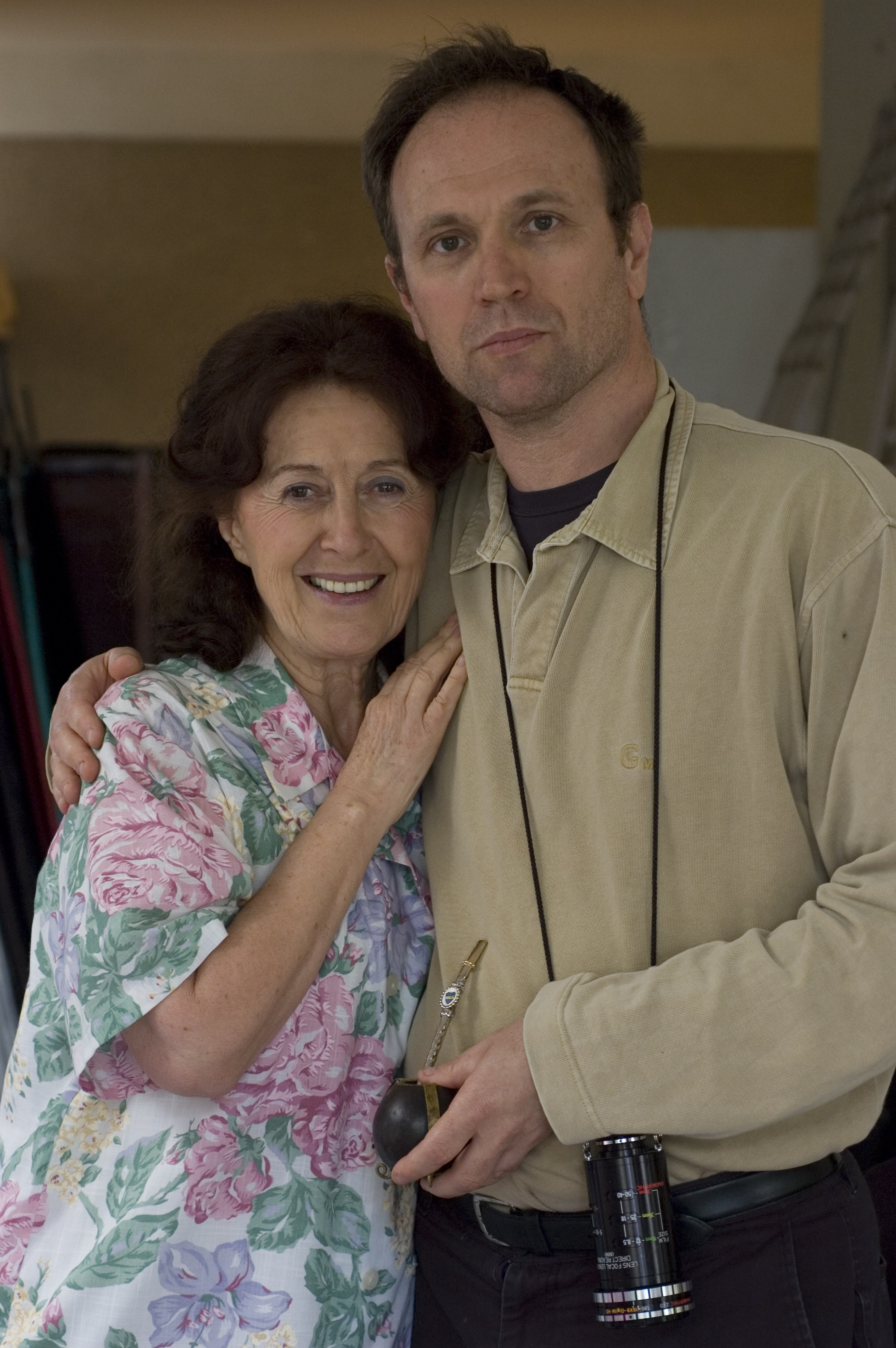 חורחה גורביץ' וריטה זהר על סט הסרט "בדרך אל החתולים", 2009